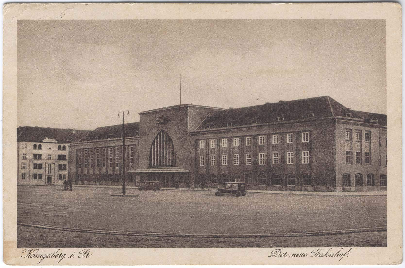 Достопримечательности города Кёнигсберг (Калининградская область РФ)